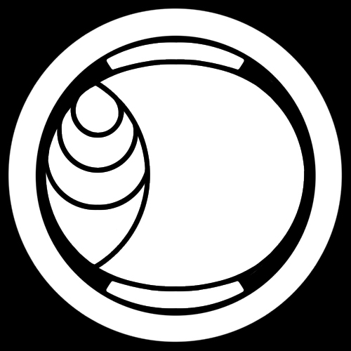 「丸に木槌」紋（染抜）